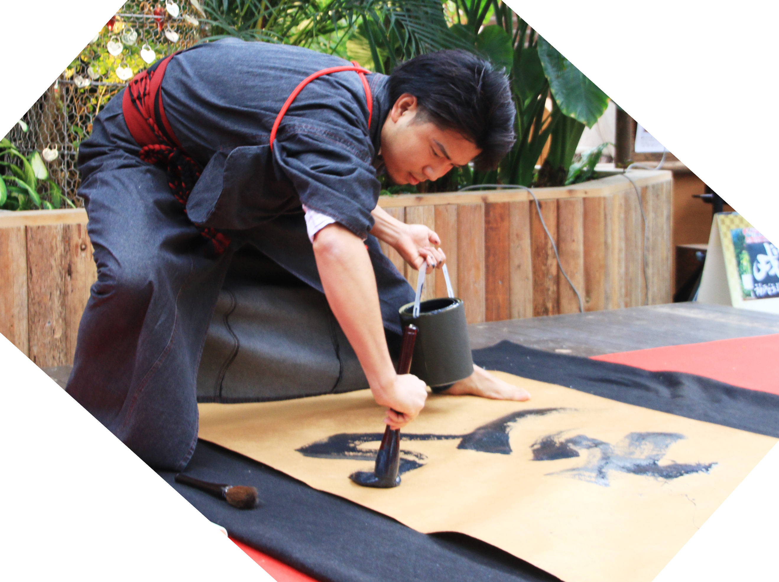 2019年1月2日に神戸どうぶつ王国で行われた書道パフォーマンス。『亥』の文字。 Canon EOS 70D